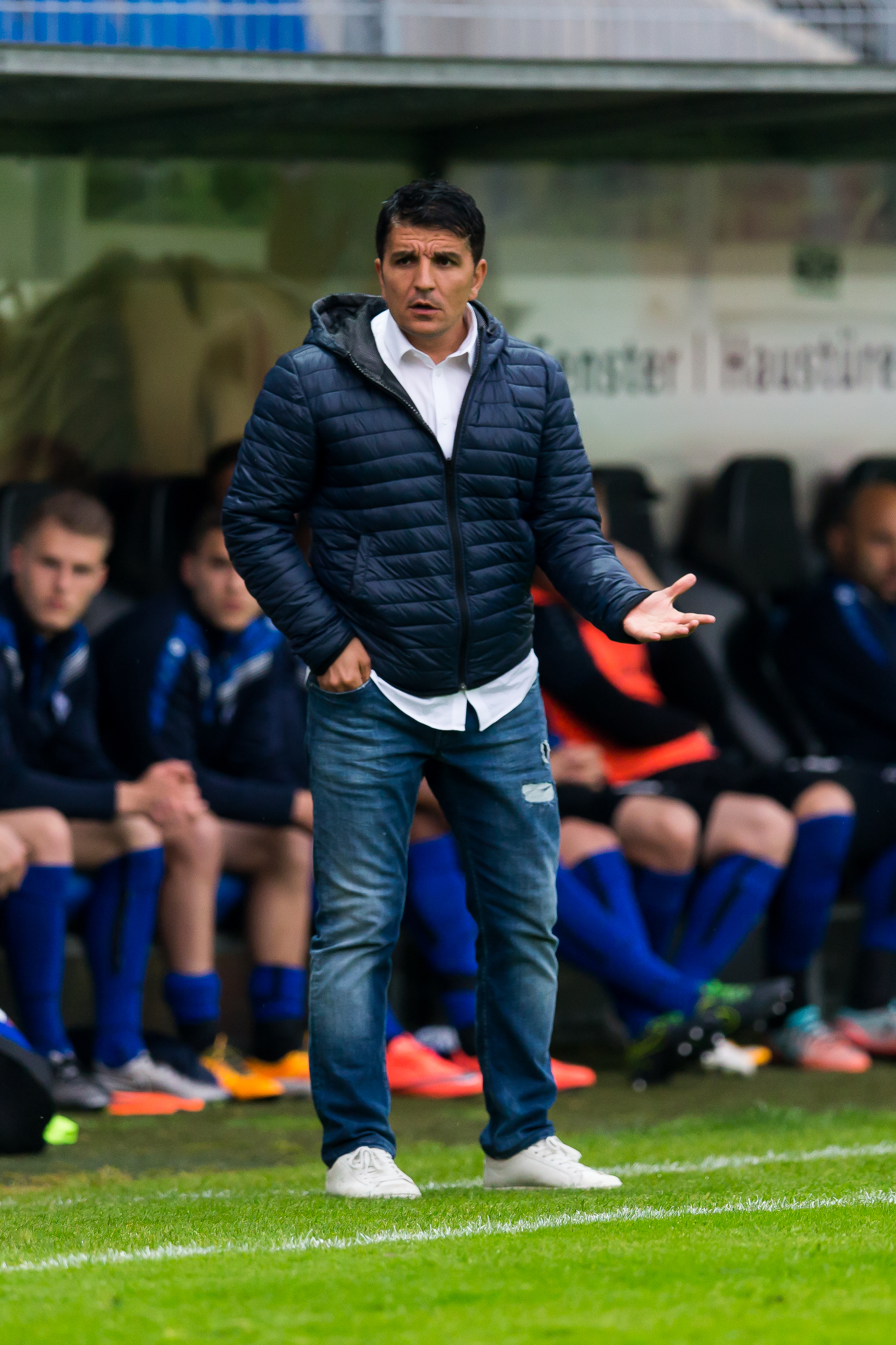 Kenan Kocak during SV Waldhof Mannheim vs SV Spielberg (3:0) at Carl Benz Stadion, Mannheim, Baden Württemberg, Germany on 2016-05-10, Photo: Sven Mandel